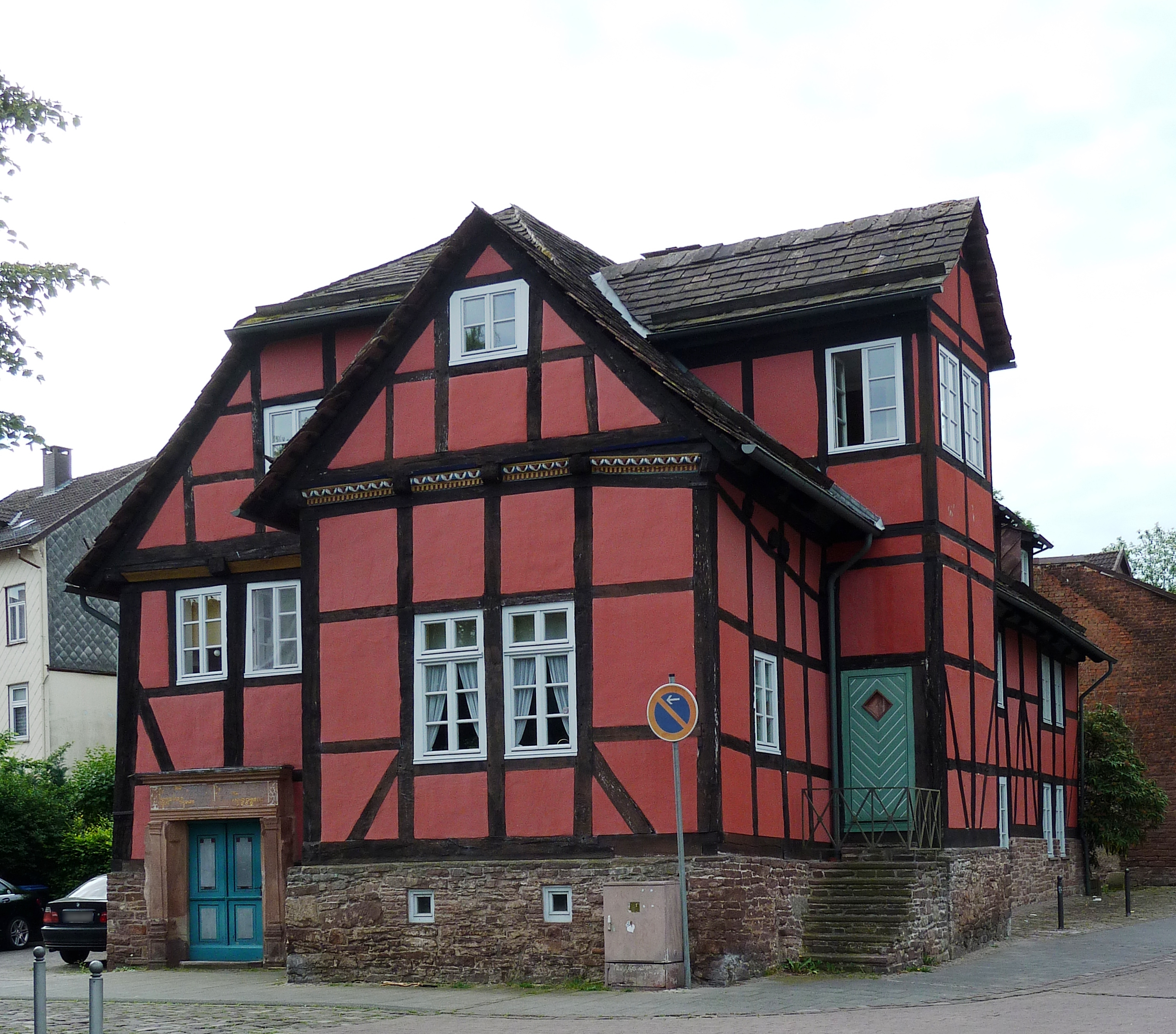 Fachwerkhaus in Holzminden, Niedersachsen. Erbaut 1609 als Wohnhaus des Amtmanns Nicolaus Thesmar, 1626 angeblich Quartier von Tilly. Das Haus überstand als einziges Fachwerkhaus den Stadtbrand von 1640